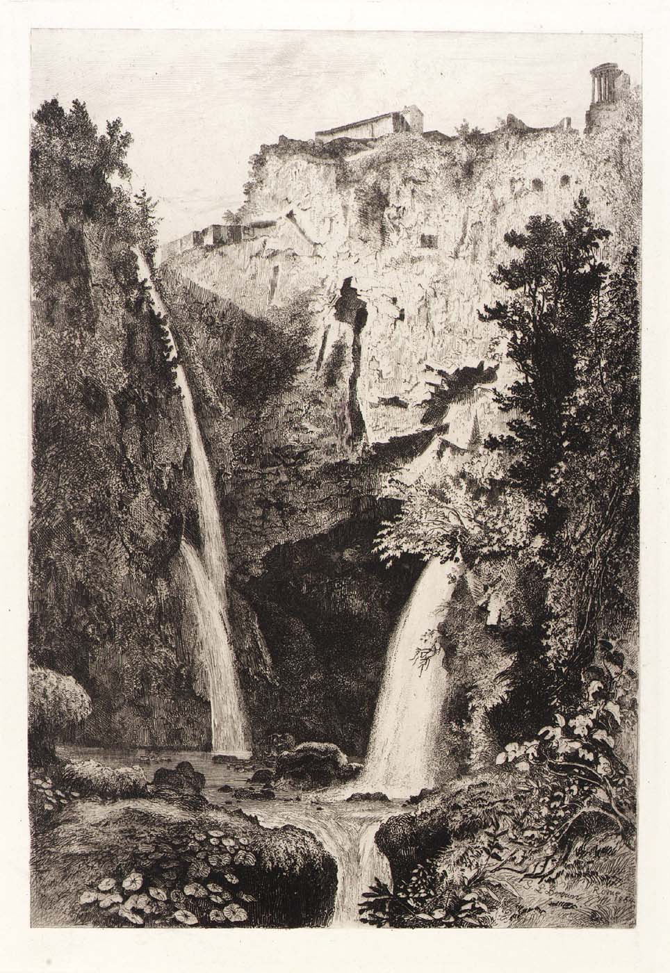 George Loring Brown (1814–1889), Falls of Tivoli (Die Wasserfälle von Tivoli) Radierung